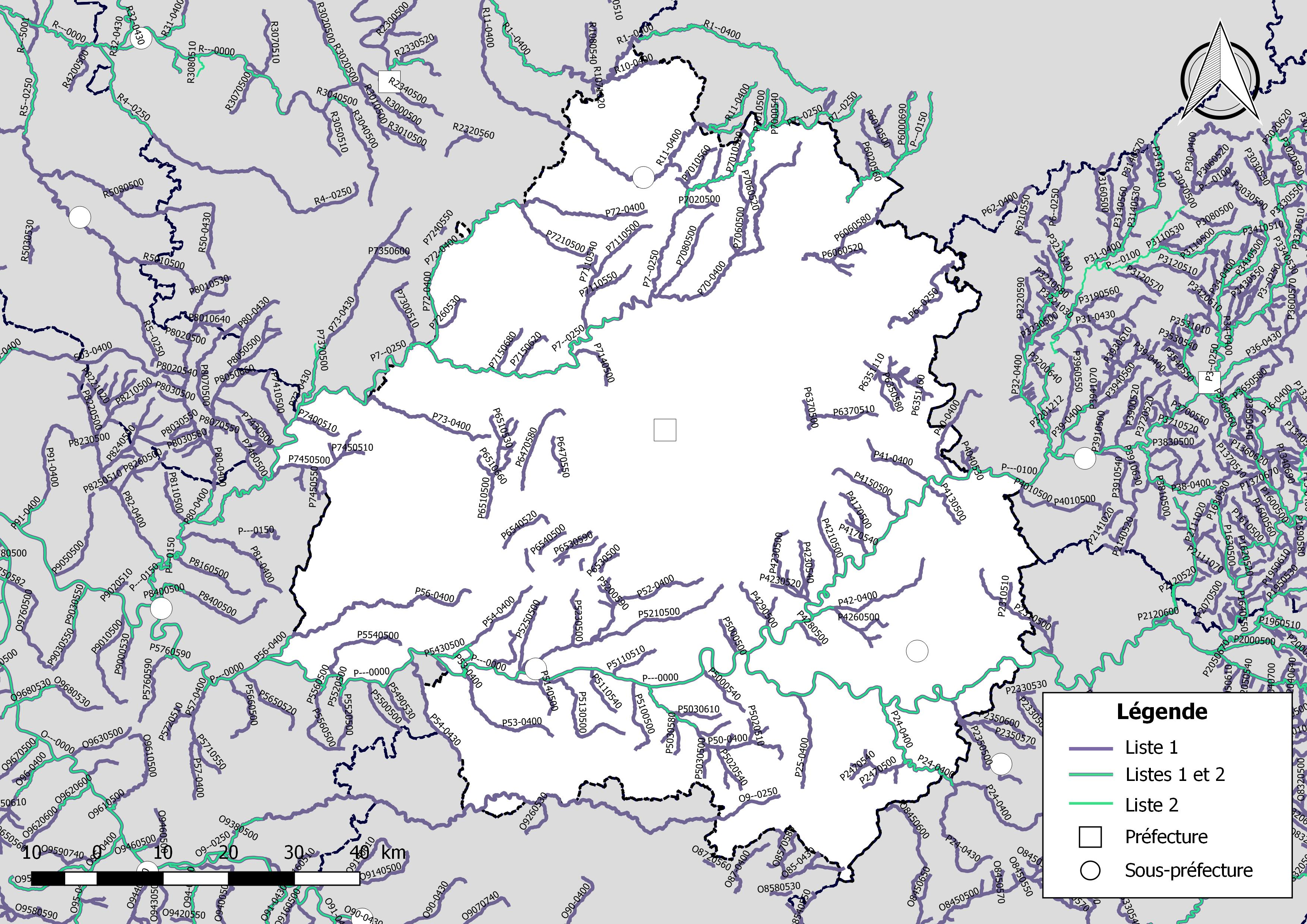 Classement des cours d'eau du département de la Dordogne (France) au titre de la continuité écologique (article L214.17 I du Code de l'environnement).